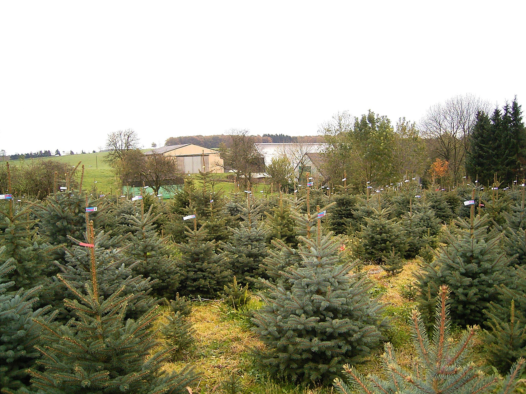 Radevormwald